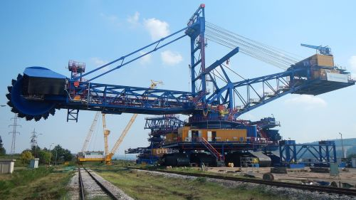 21. 12. 2016. Рб „Kолубара“ на површинском копу „ Поље Б/Ц“